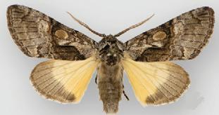 Charadra franclemonti male